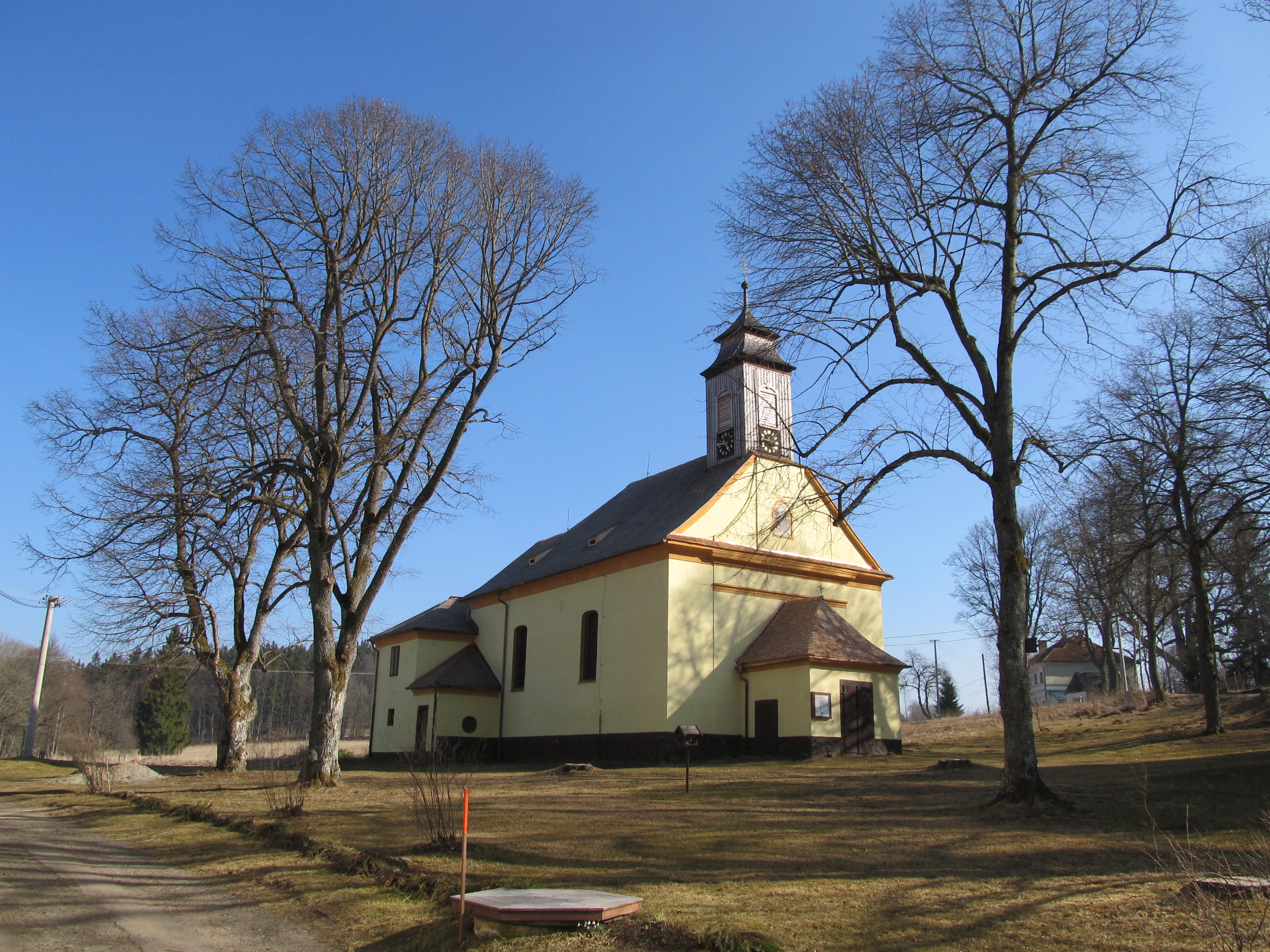 Křišťanov - kostel Jména Ježíš